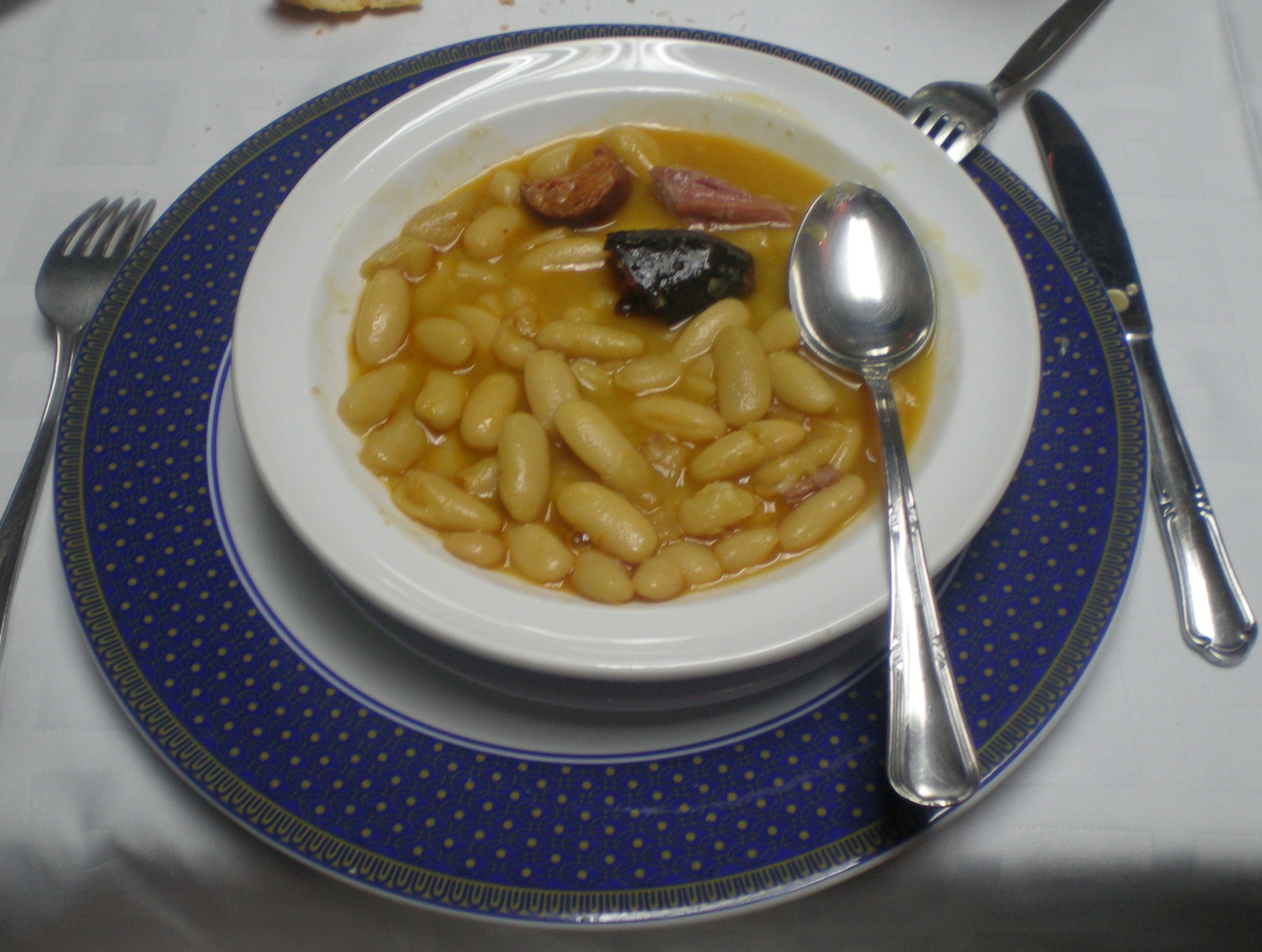 Plato de Fabada en la Sociedad Gastronómica El Rinconín, (Oviedo, Asturias-España)